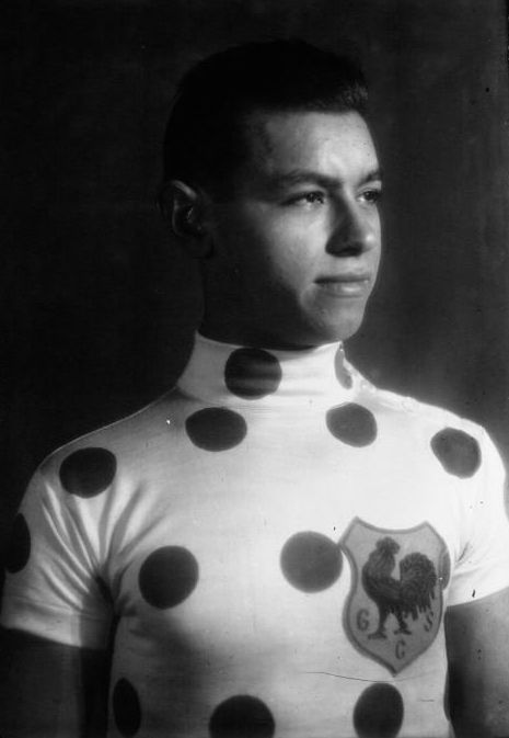 Guimbretière, coureur cycliste (portrait) : [photographie de presse] / Agence Meurisse